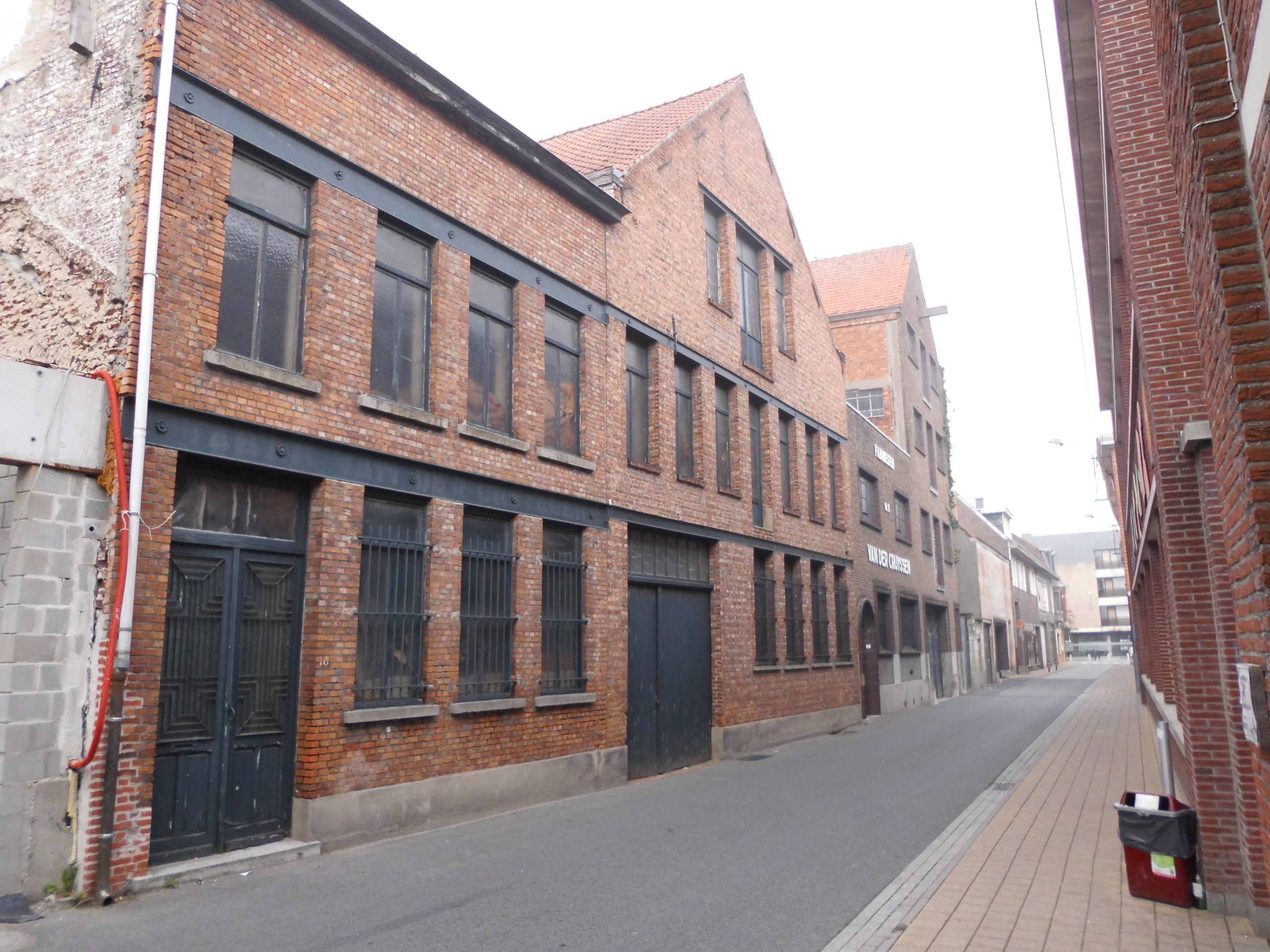 Gebouwen van het Tabaksbedrijf Van Der Cruyssen - Kaaistraat - Deinze - Oost-Vlaanderen - België